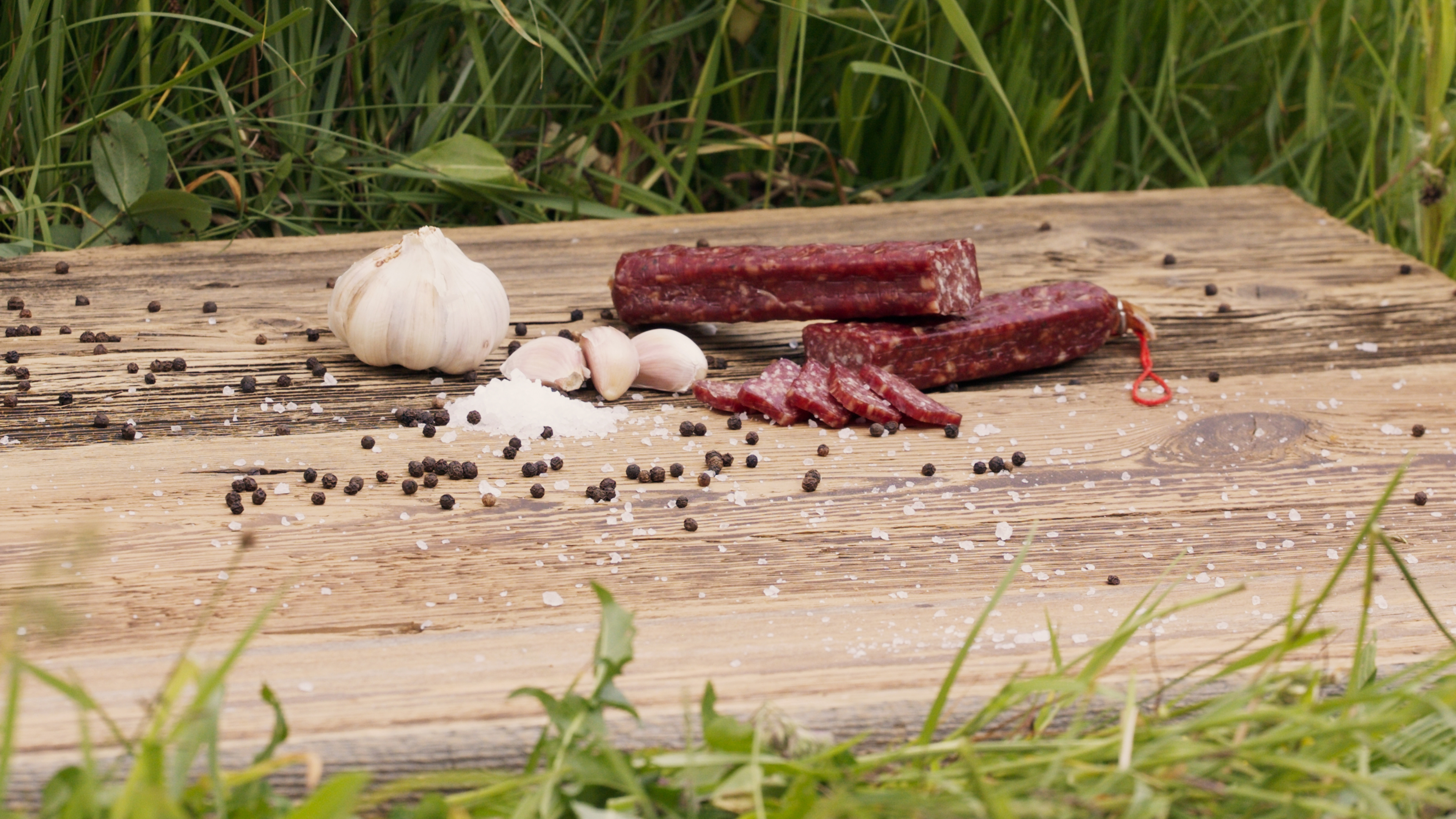 Appenzeller Fleischspezialitäten Pantli IGP